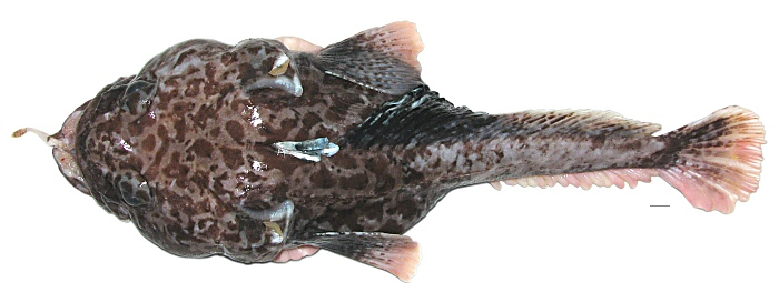 Hopbeard plunderfish Pogonophryne neyelovi Shandikov et Eakin, 2013, holotype, male, dorsal view, Ross Sea, Antarctica